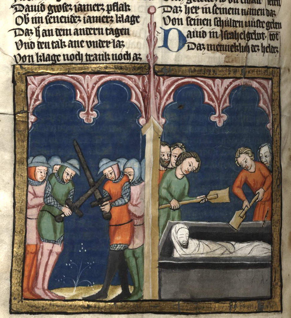 Rudolf von Ems: Weltchronik. Böhmen (Prag), 3. Viertel 14. Jahrhundert. Hochschul- und Landesbibliothek Fulda, Aa 88. Bildbeschreibung nach Martin Roland. Miniatur 161 261v Begräbnis Abners